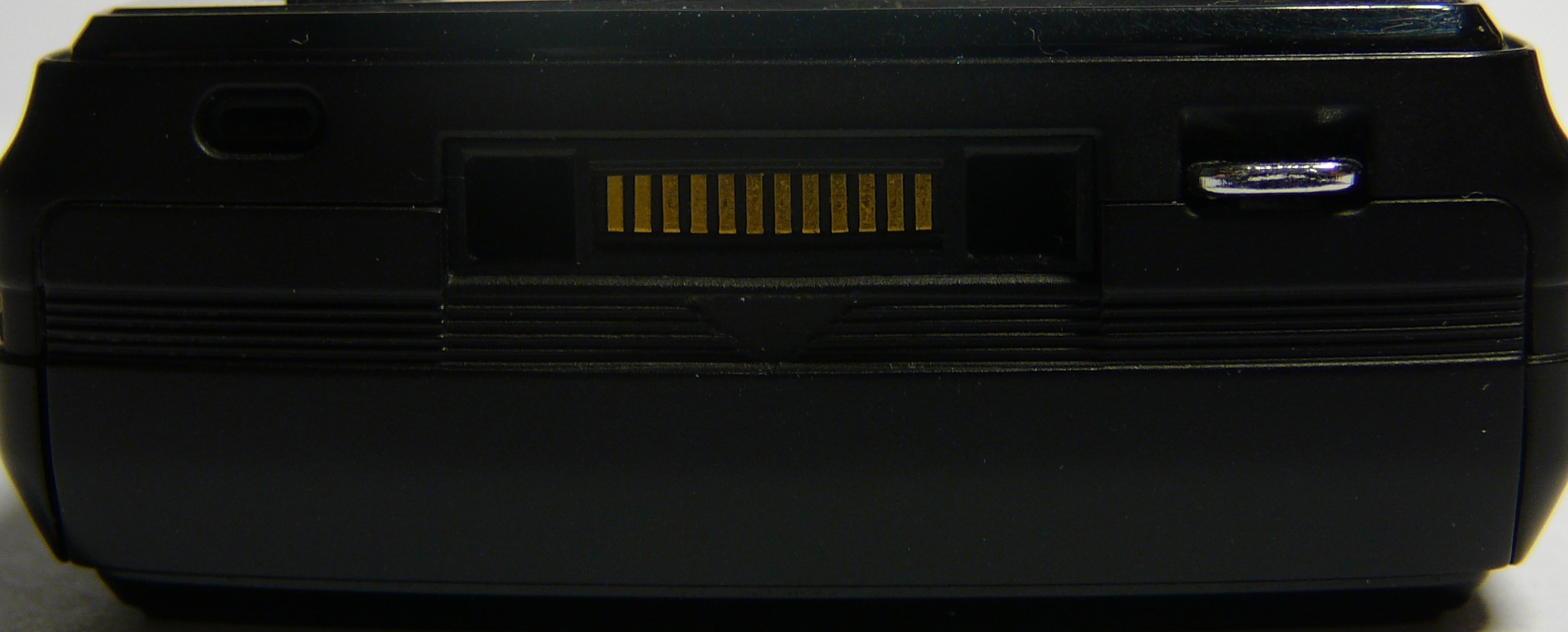 K850i csatlakozó